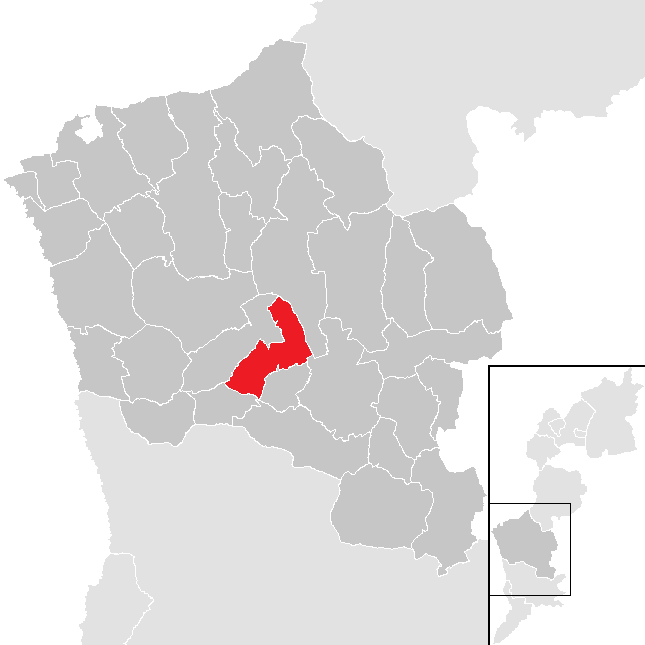 Bezirk Oberwart